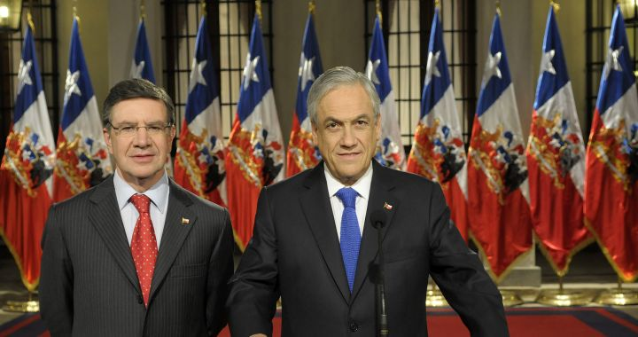 Cadena Nacional de Radio y Televisión: Presidente Piñera anunció Gran Acuerdo Nacional por la Educación